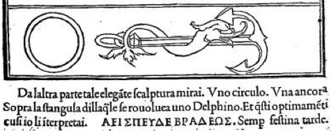 Illustration du Songe de Poliphile. Illustration de l'adage Semper festina tarde' (Semp. festina tarde); en grec: ΑΕΙ ΣΠΕΥΔΕ ΒΡΑΔΕΟΣ) . Édition d'Alde Manuce (Venise, 1499).